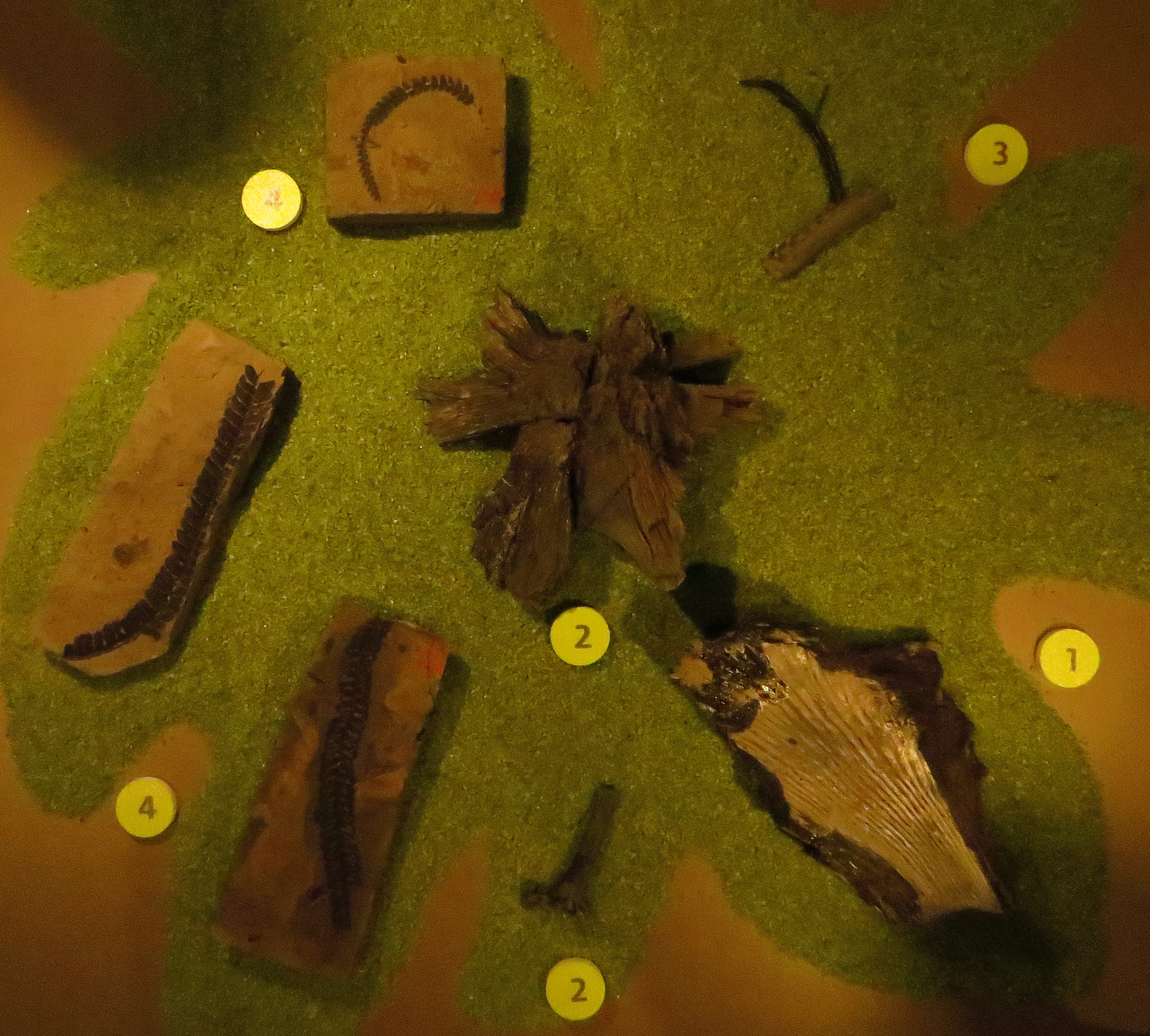 Fossil - Took The picture at Royal Belgian Institute of Natural Sciences, Brussels